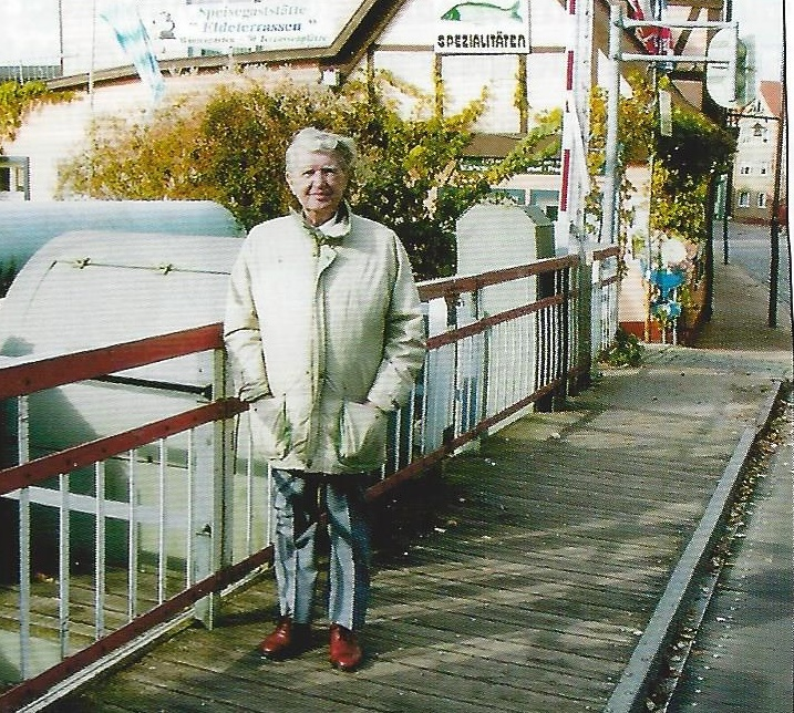 Gerhard Gerigk auf der Hubbrücke über die Elde in Lübz